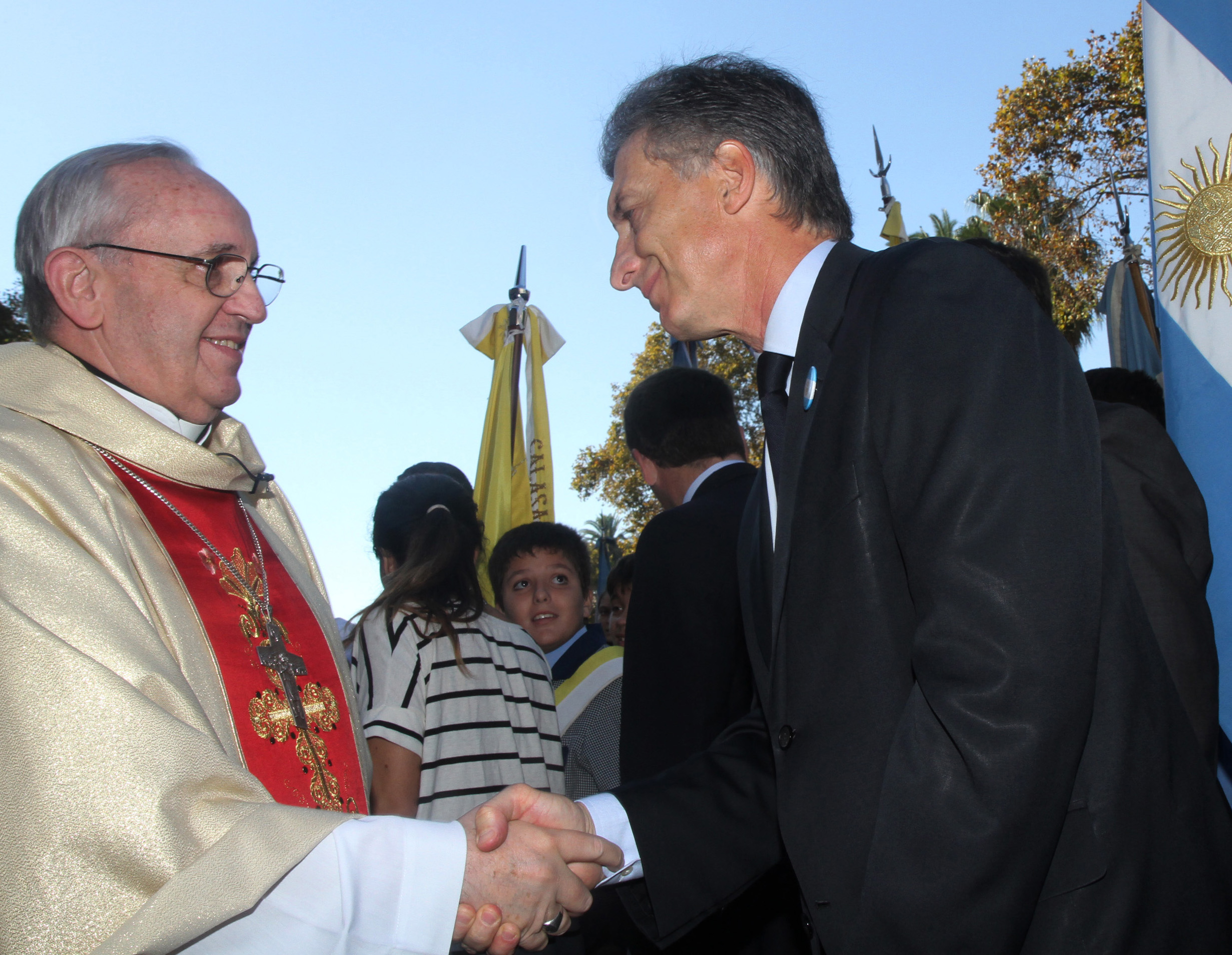 Buenos Aires. Abril 18 de 2012. El jefe de Gobierno porteño, Mauricio Macri, asistió esta mañana a la tradicional misa anual por la educación que ofició el arzobispo de Buenos Aires, Jorge Bergoglio, en la Catedral metropolitana.- Foto Sandra Hernandez-gv/GCBA.